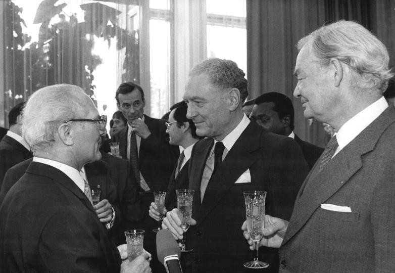 ADN-ZB Mittelstädt-29.6.81-eng-Berlin: Der Generalsekretär des ZK der SED und Vorsitzende des Staatsrates der DDR, Erich Honecker, empfing die in der DDR akkreditierten Chefs der diplomatischen Missionen zur Entgegennahme ihrer Gratulation anläßlich seiner Wahl zum Vorsitzenden des Staatsrates der DDR. Hier im Gespräch mit dem Botschafter der USA, Herbert S. Okun (Mitte), und dem Botschafter Großbritanniens, Peter Martin Foster (r).